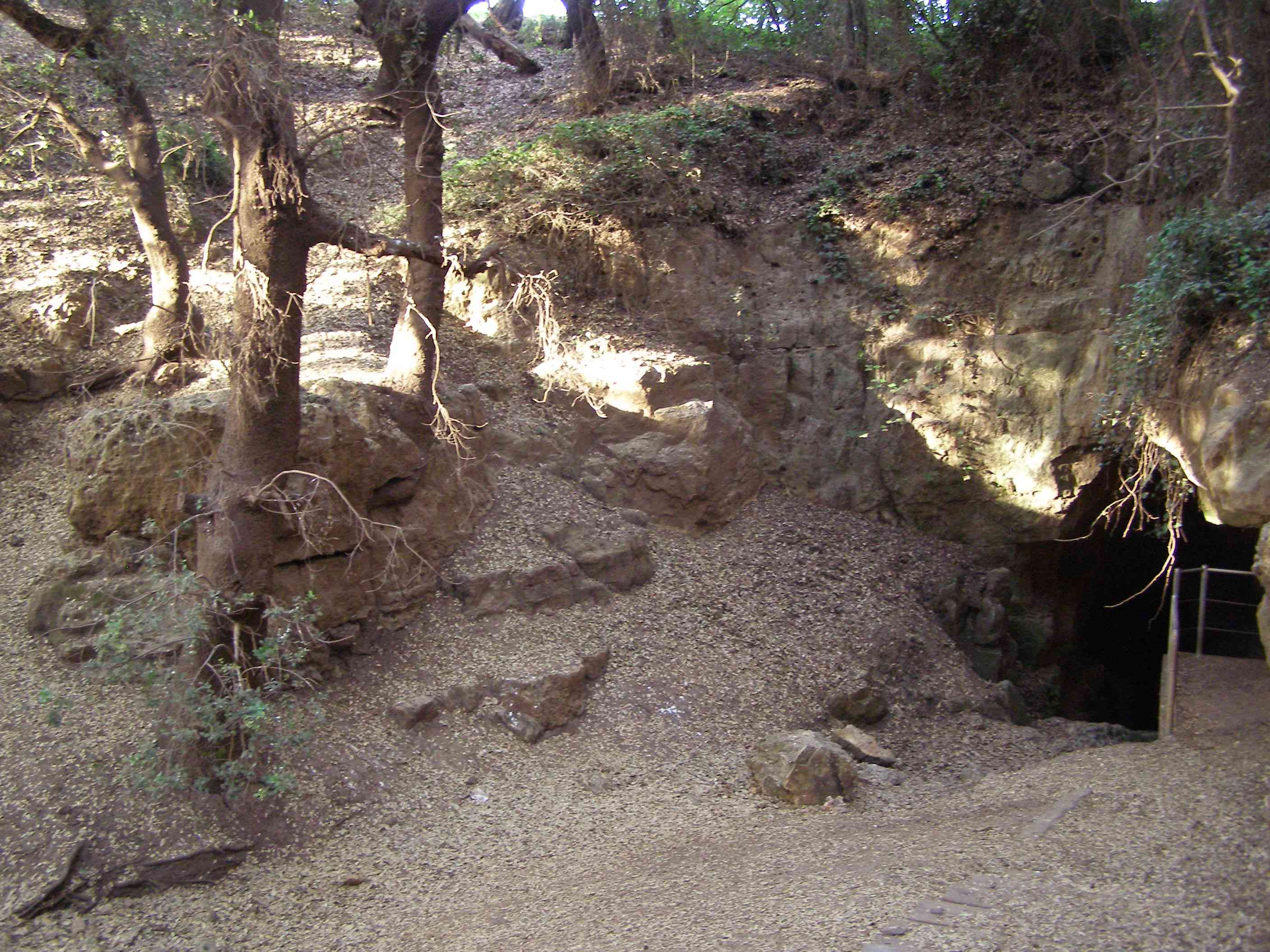 מערת פער.